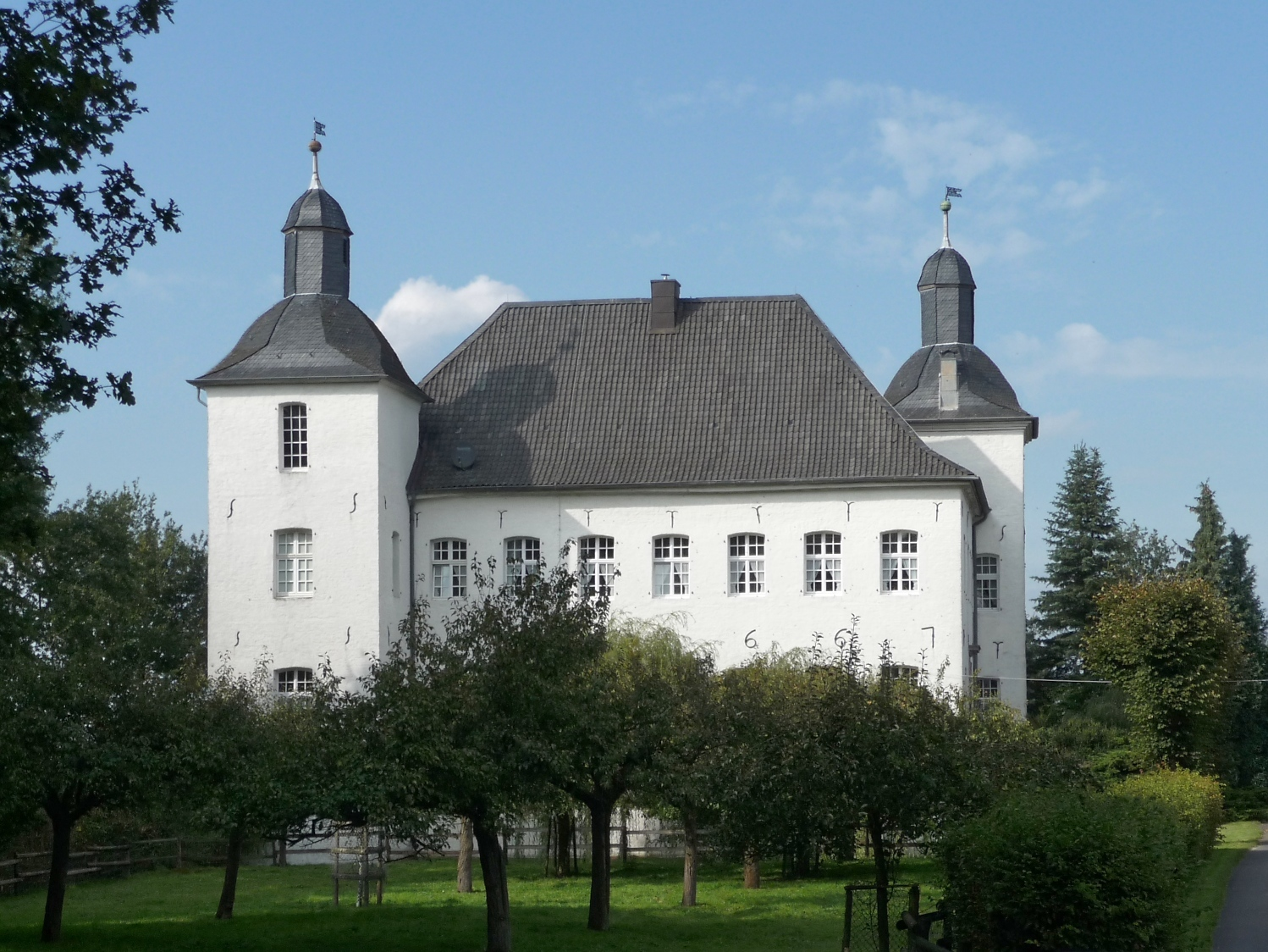 Denkmalliste Nr. 4 Wasserburg in Vorst, Haus Neersdonk 1